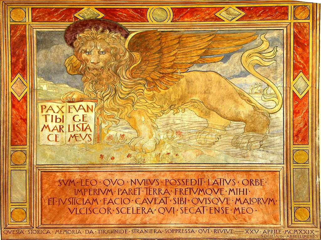 Rovereto_Il Leone di san Marco, affresco